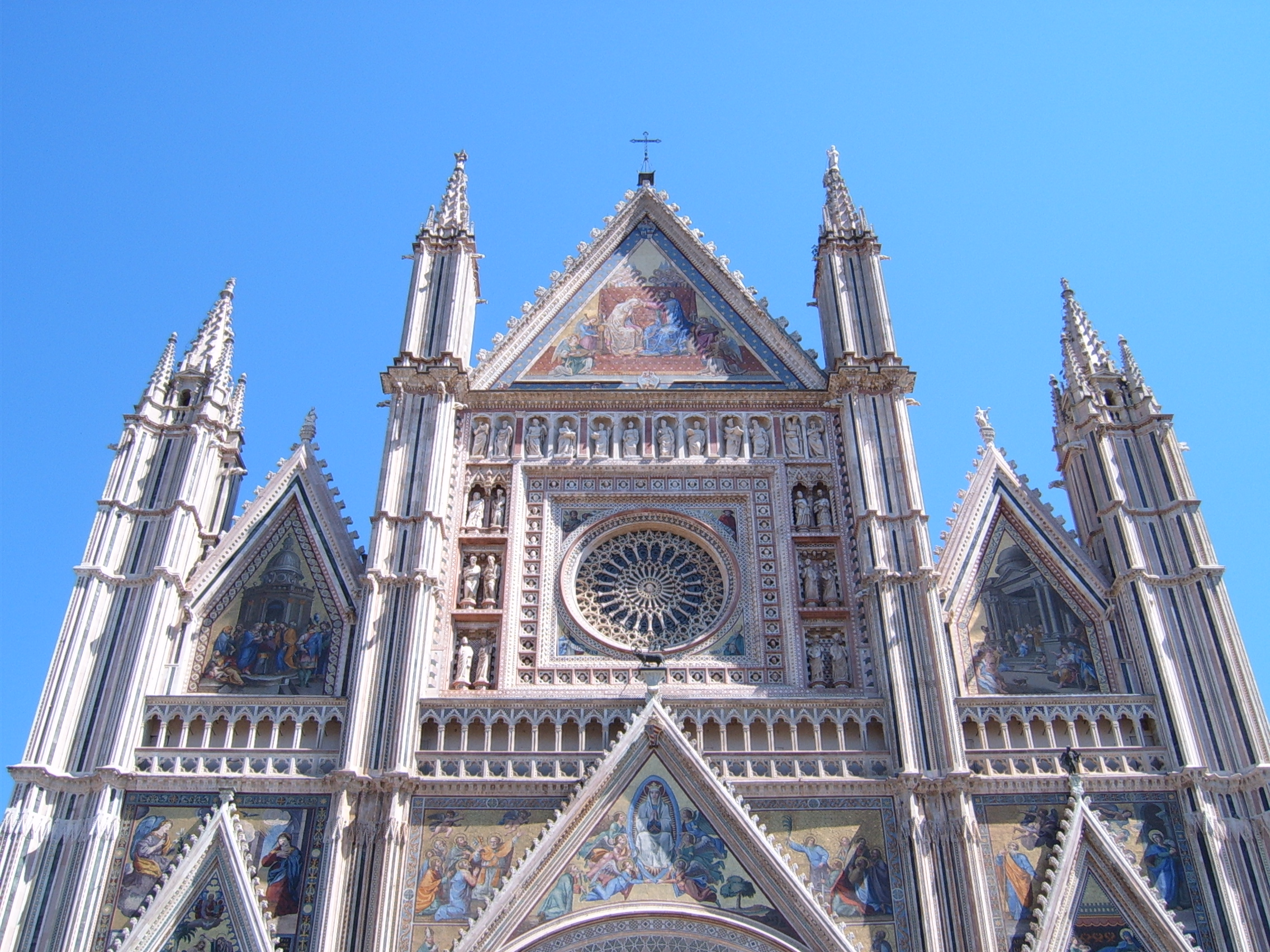 Duomo di Orvieto (Umbria, Italia)